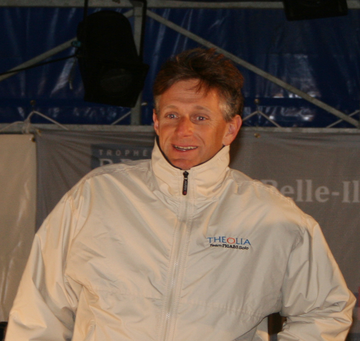 Description =Robert Nagy. Soirée présentation des skippers a Belle-Ile lors du Trophée BPE Source =Photo taken by Remi Jouan Date =Mars 2007 Author =Remi Jouan